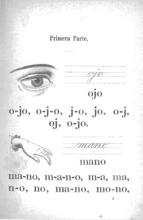 Fuente original: Claudio Matte, Nuevo método (fonético-analítico-sintético). Leipzig: Imp. de F.A. Brockhaus, 1884.